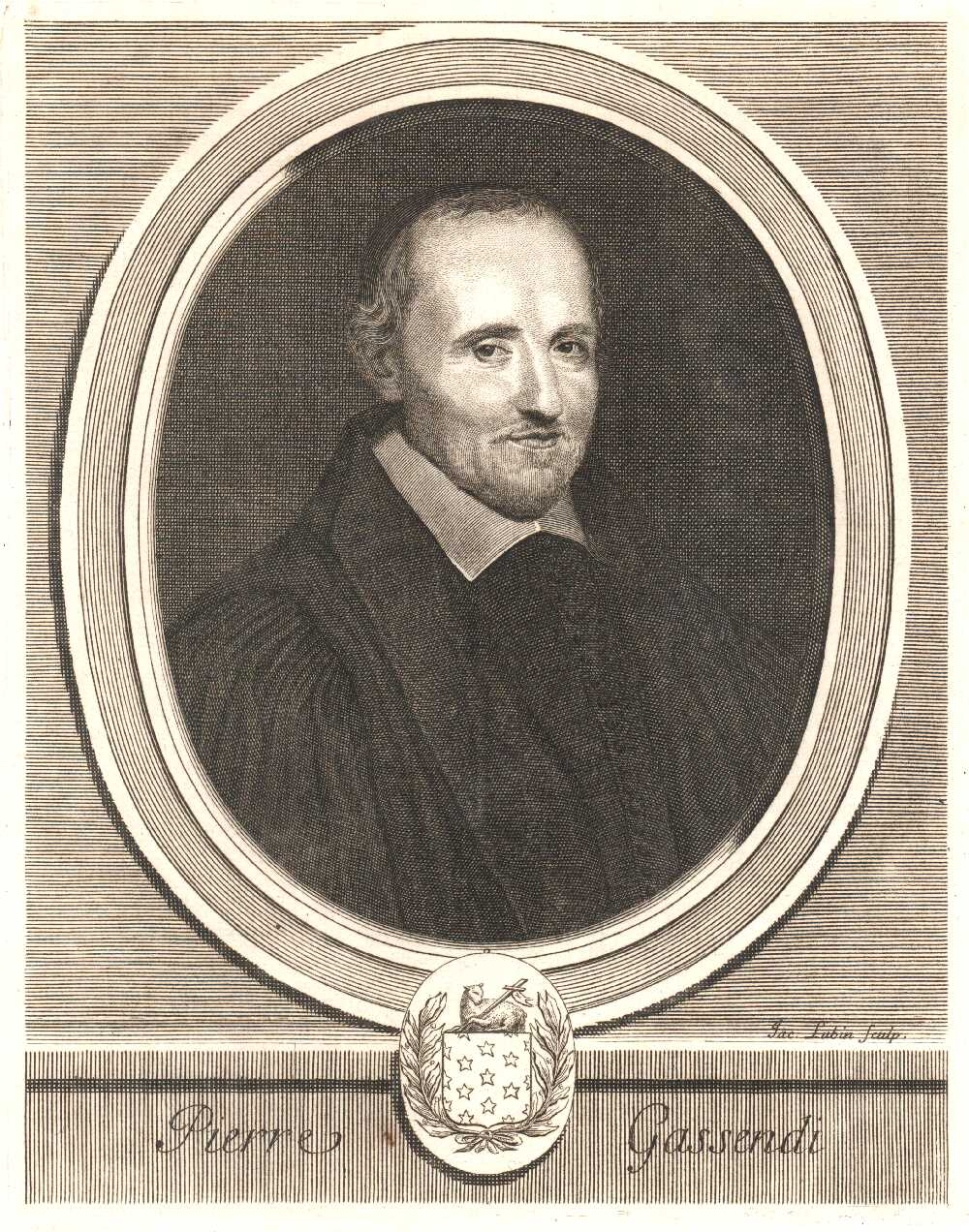 Portrait von Pierre Gassendi (1592-1655)